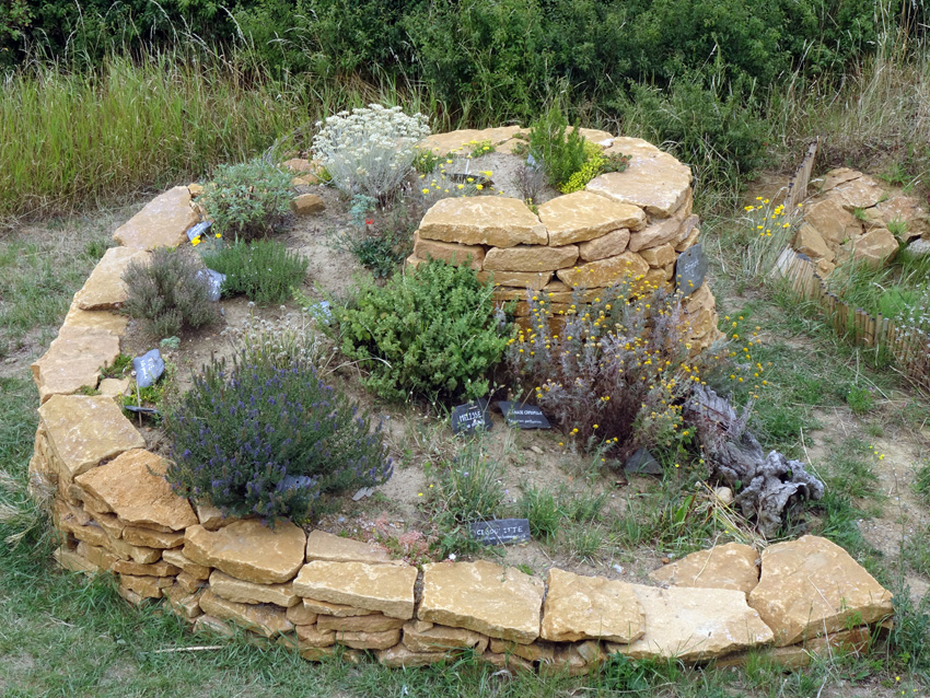 Spirale de plantes aromatiques construite à l'Ecocentre du Lyonnais. Association ARTHROPOLOGIA